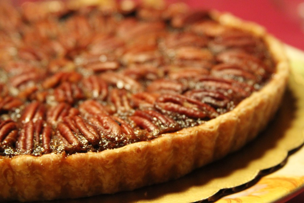 Pecan pie.